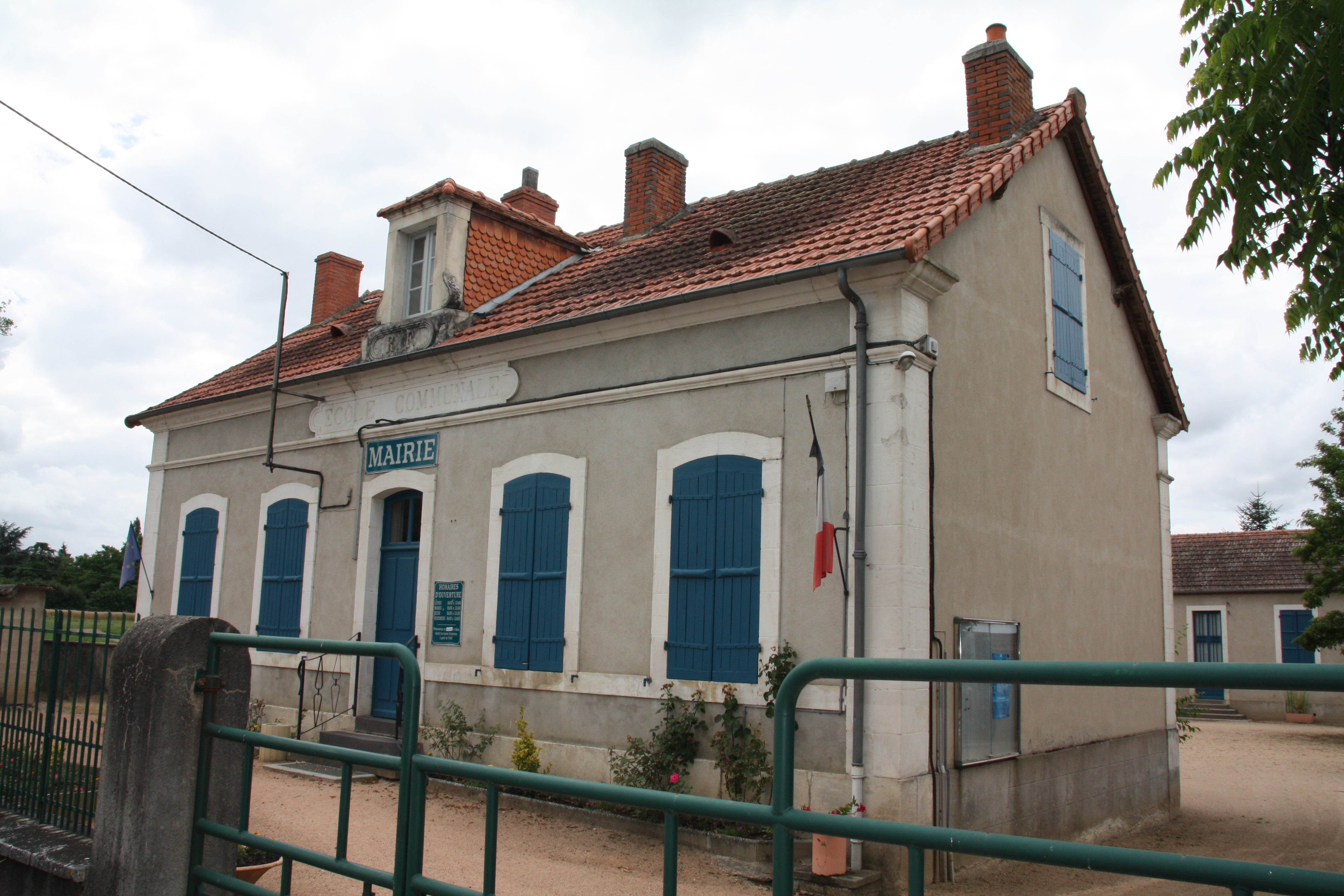 Mairie de Reugny, France